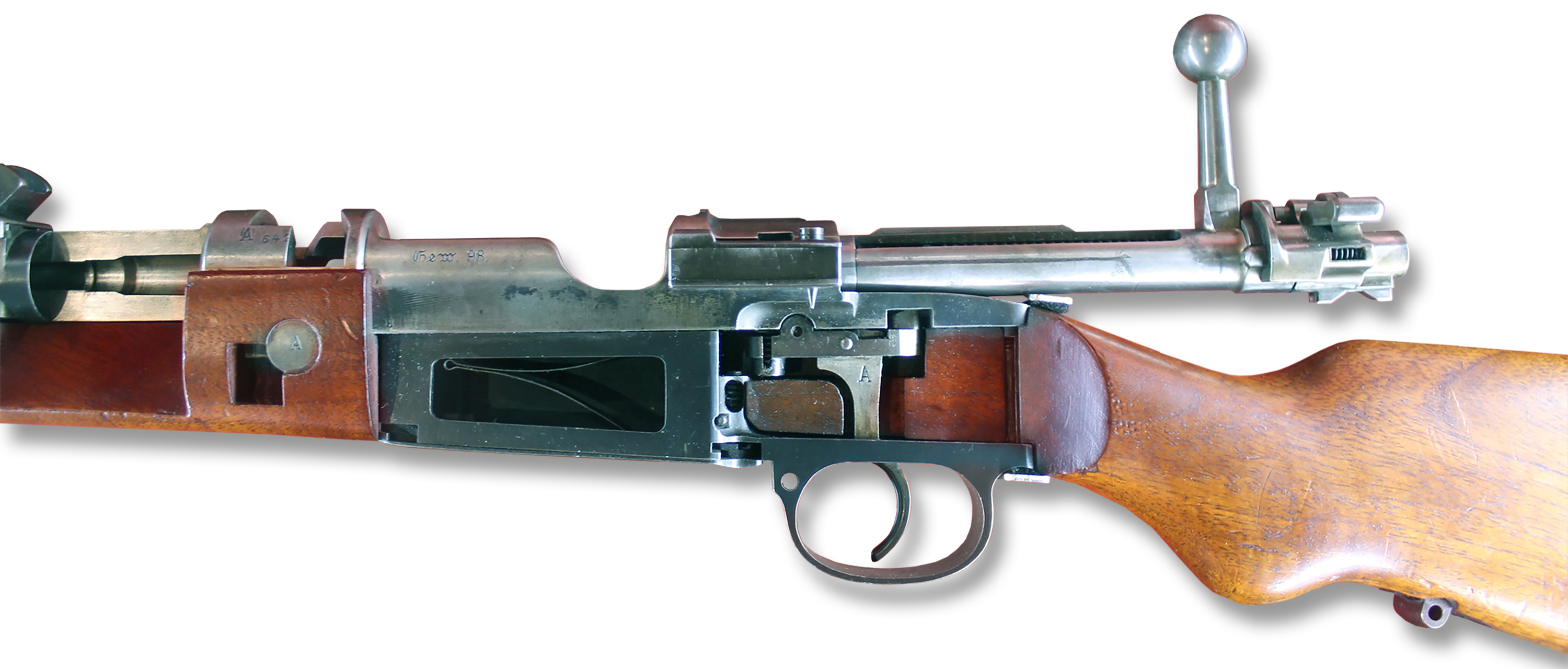 Modifizierte Darstellung (Hintergrund entfernt / Kleinere Tonwertkorrekturen / "Technischen" Schatten gesetzt) es Bildes von Markscheider.